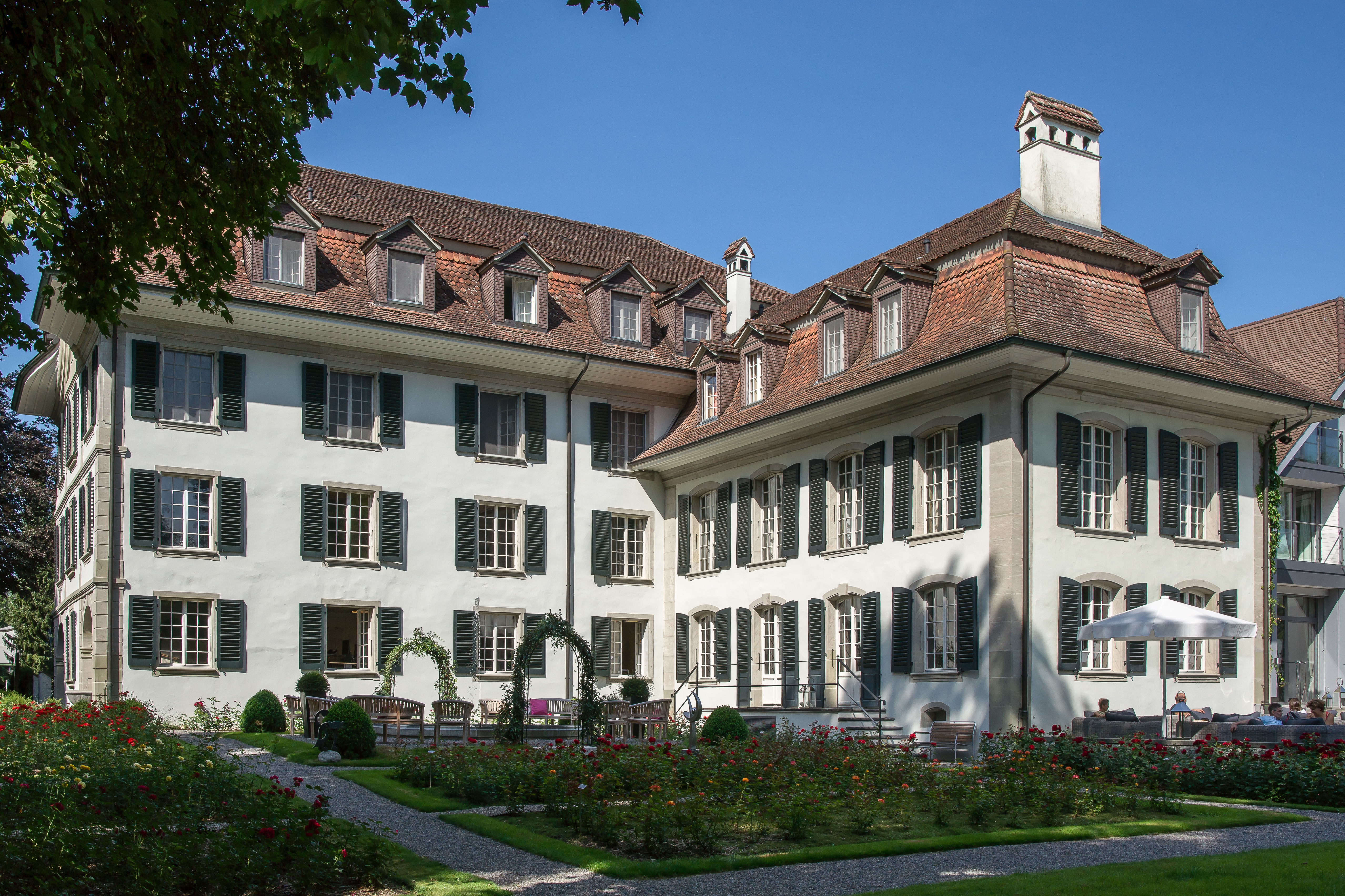 Schloss Hünigen, mit Rosengarten im Park